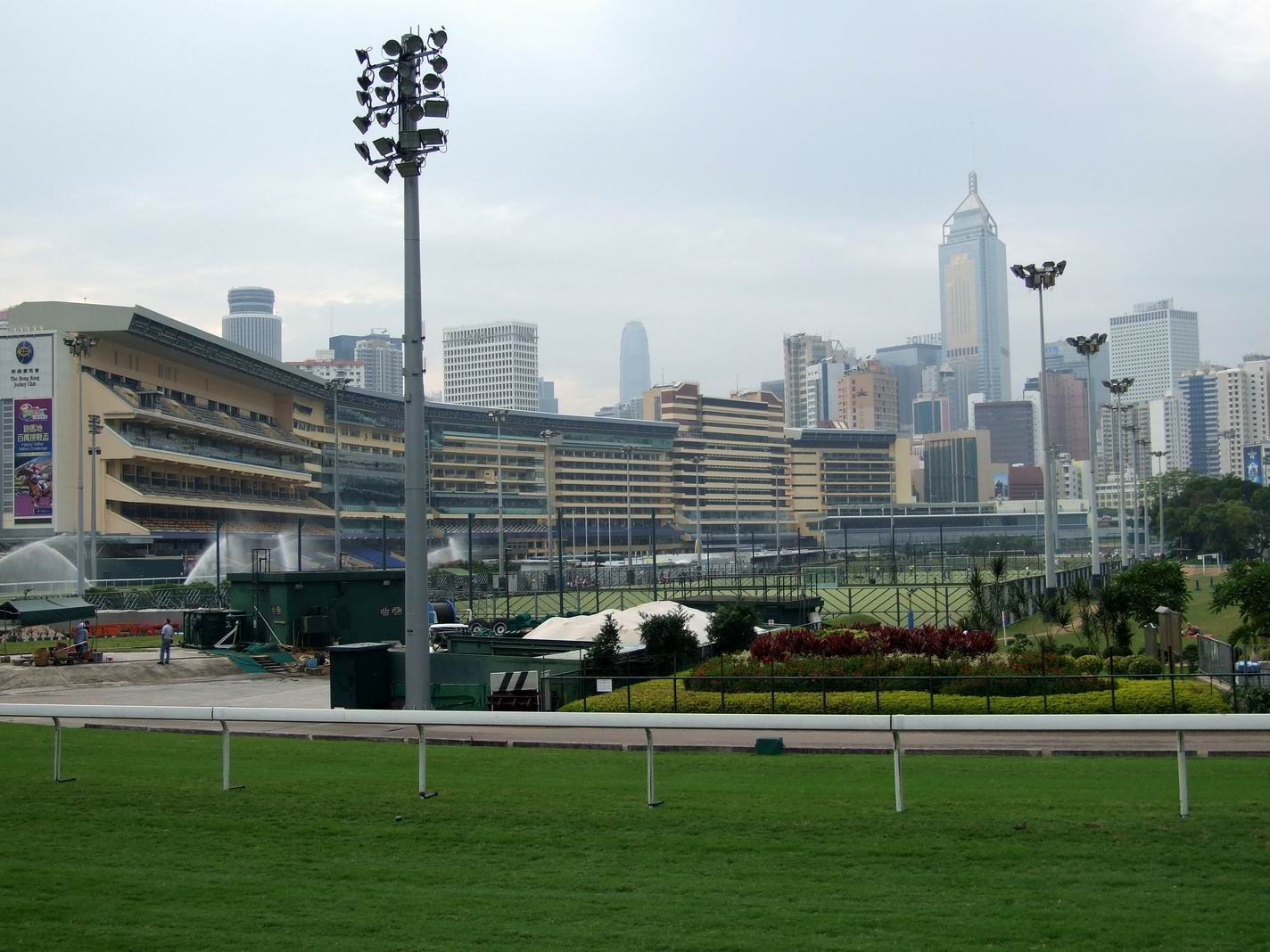 跑馬地馬場聯合看台